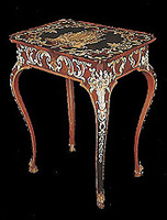 Tavolino di Pietro Piffetti fabbricato per il barone Rehbinder.